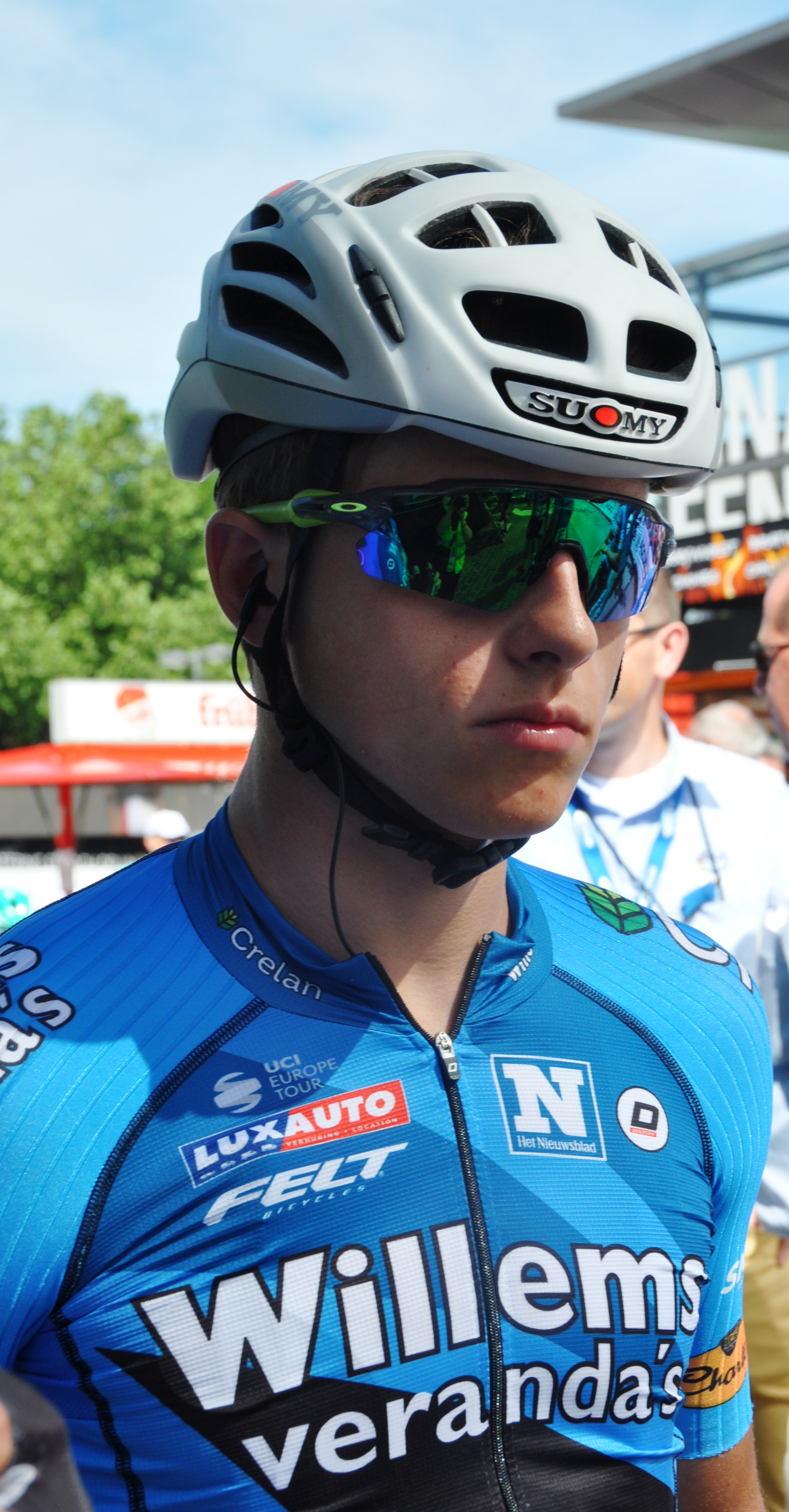 Jappe Jaspers, belgischer Radsportler